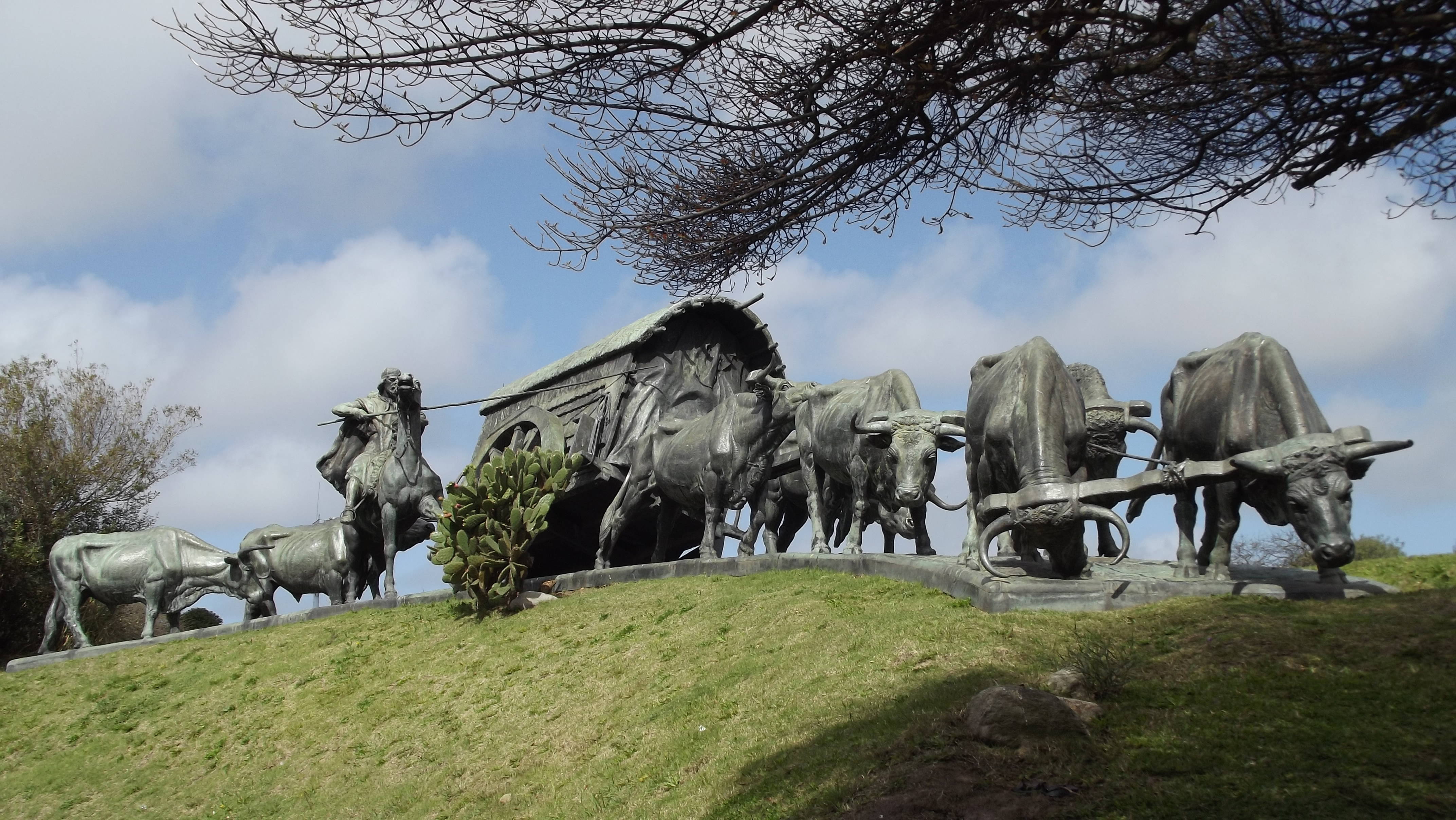 La Carreta. Ubicada en el departamento de Montevideo